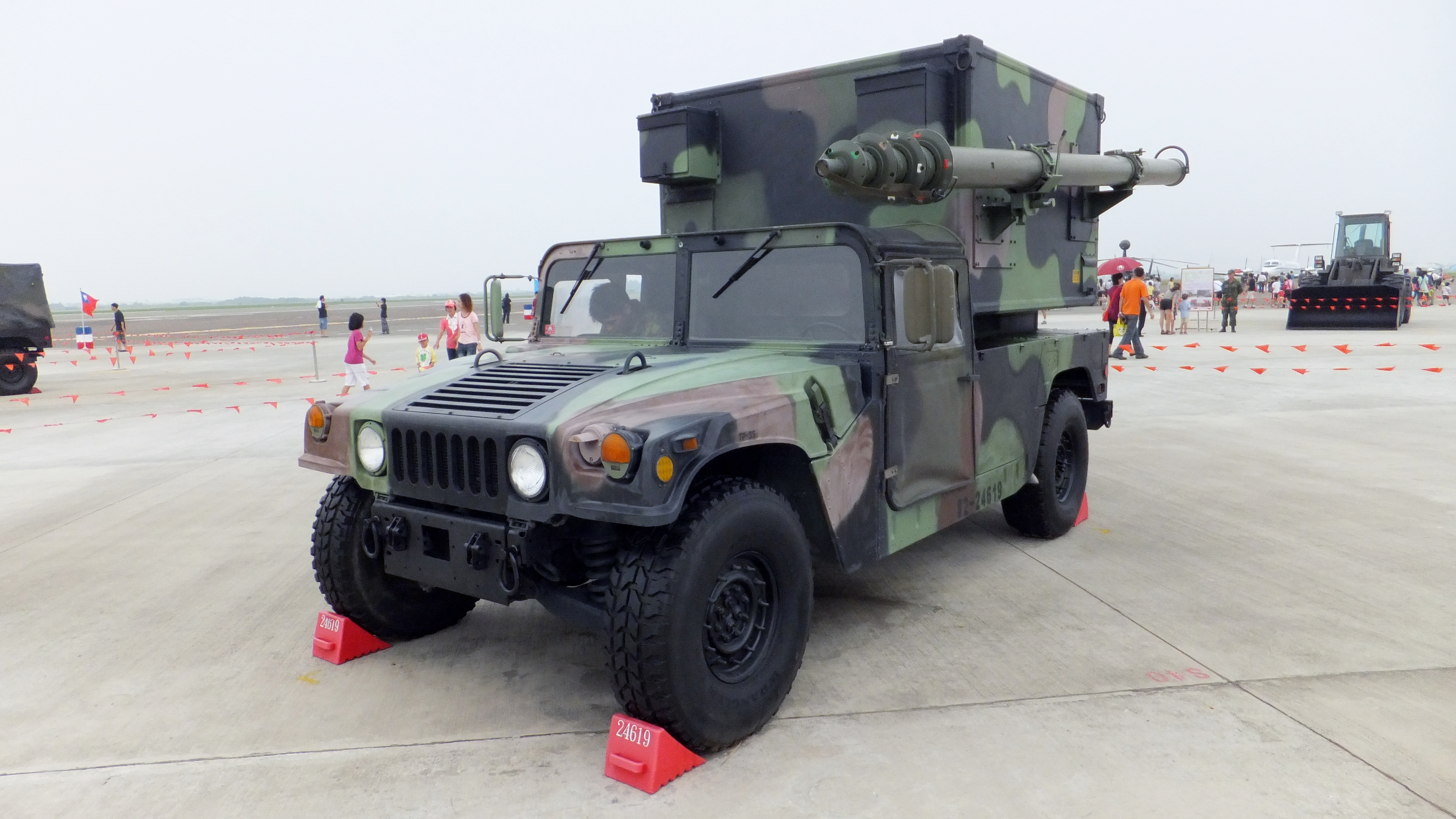 2011年空軍岡山基地營區開放活動，展示的陸軍M1042戰術區域通訊系統悍馬車。